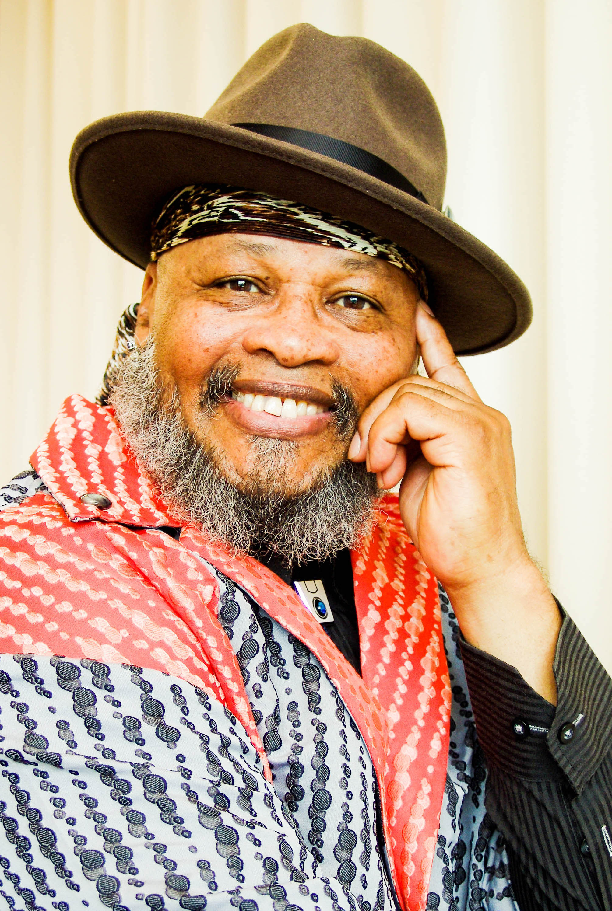 Montana King ポートレート